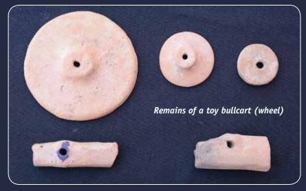 Индская цивилизация